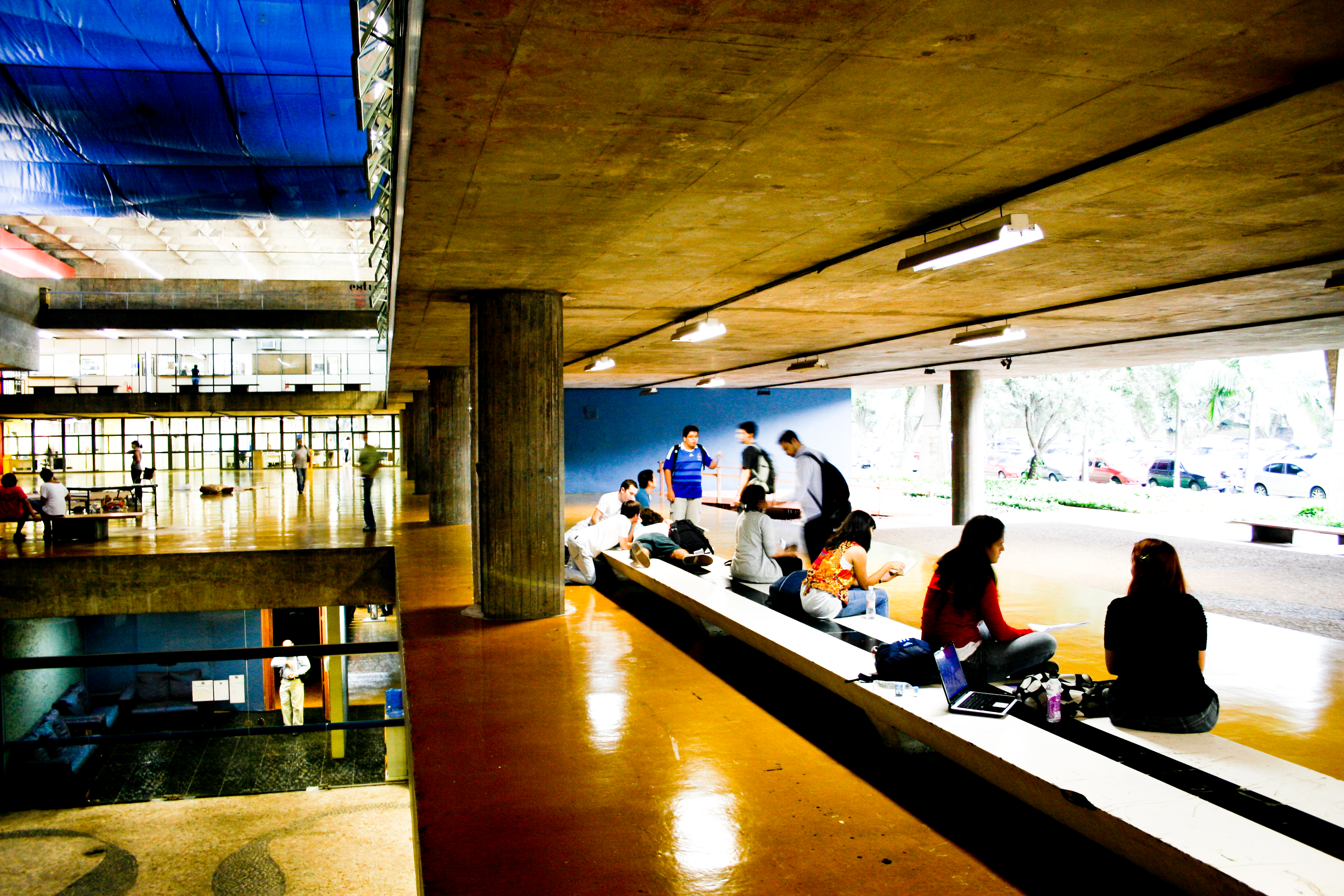 Rua do Lago, 876, Cidade Universitária. Foto por Felipe Lavignatti para o Arte Fora do Museu (